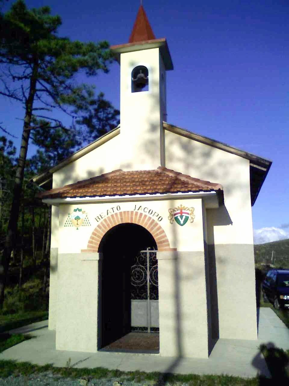 Cappella del Beato Jacopo da Varagine in Varazze (Italy)